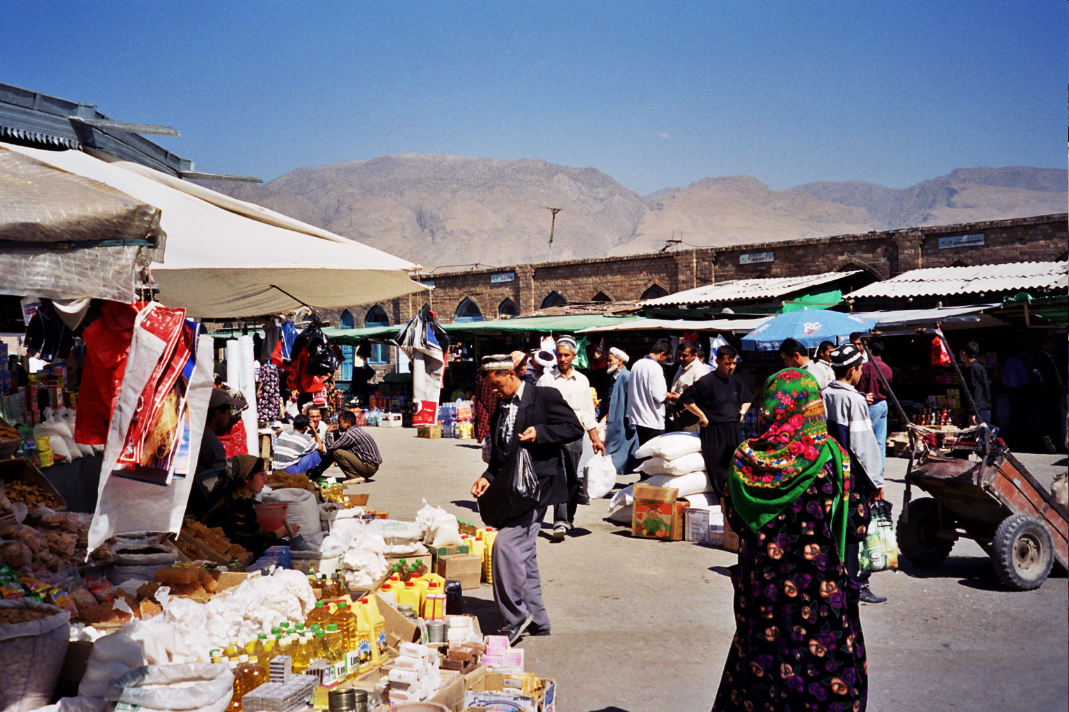 Bazaar in Panjakent, Tajikistan